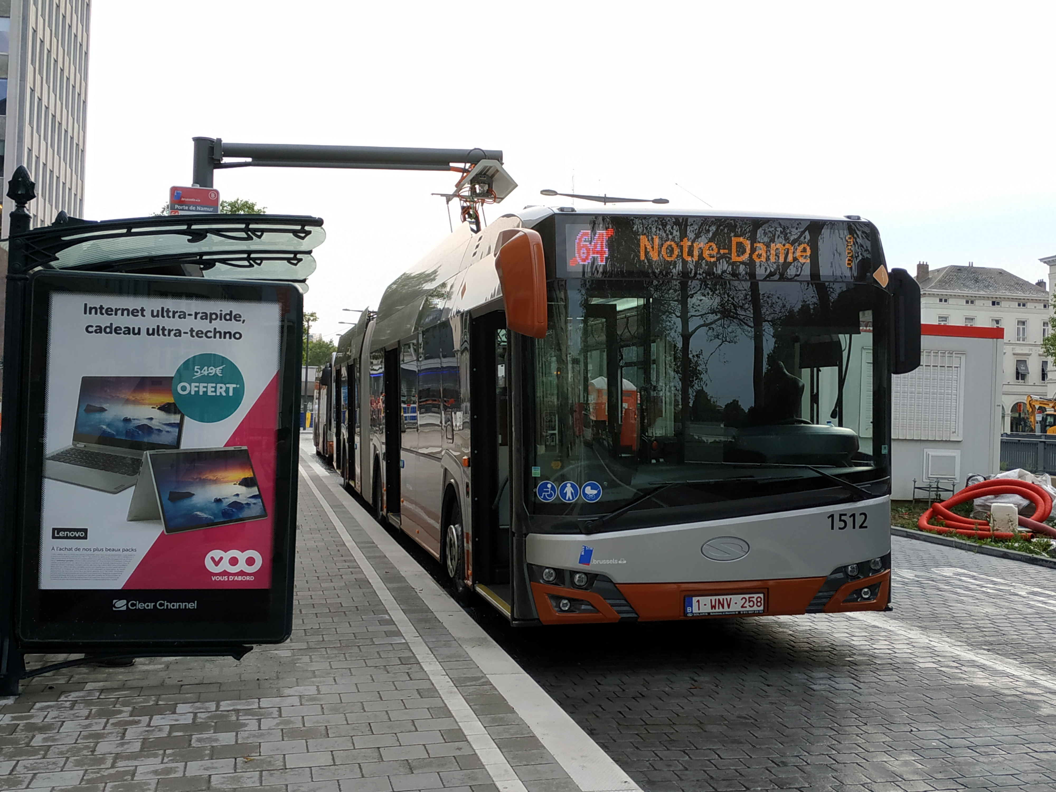 Solaris Urbino 18 electric du réseau STIB/MIVB en charge à une station de Bruxelles